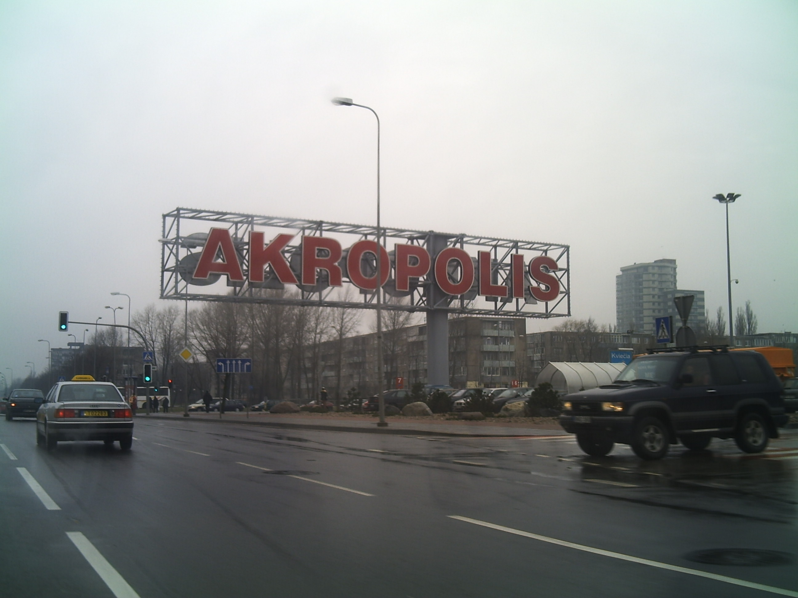 Akropolis Supermarket in Klaipeda